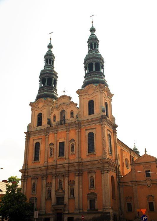 Polska